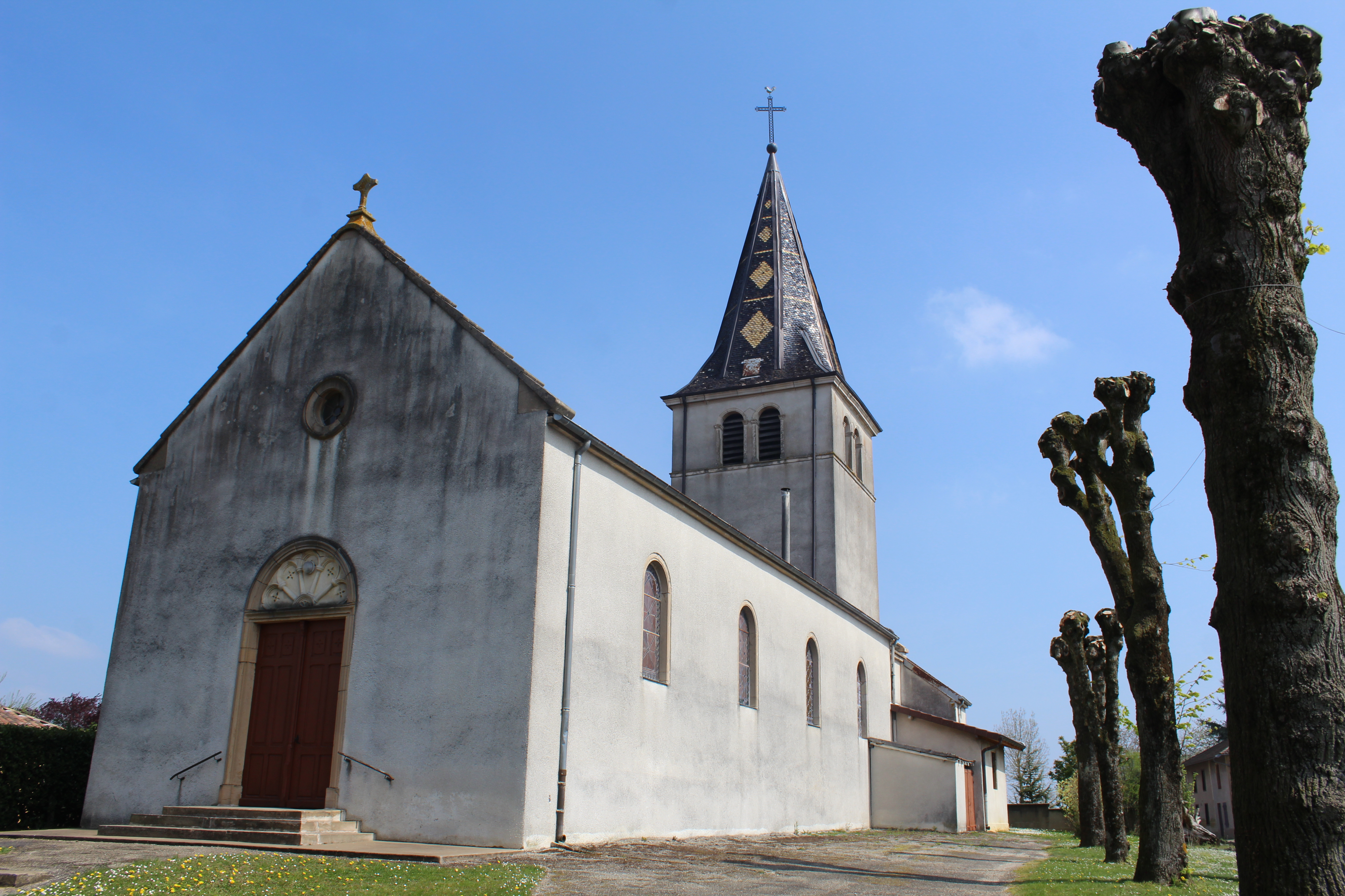 Église Saint-Georges de Béréziat.